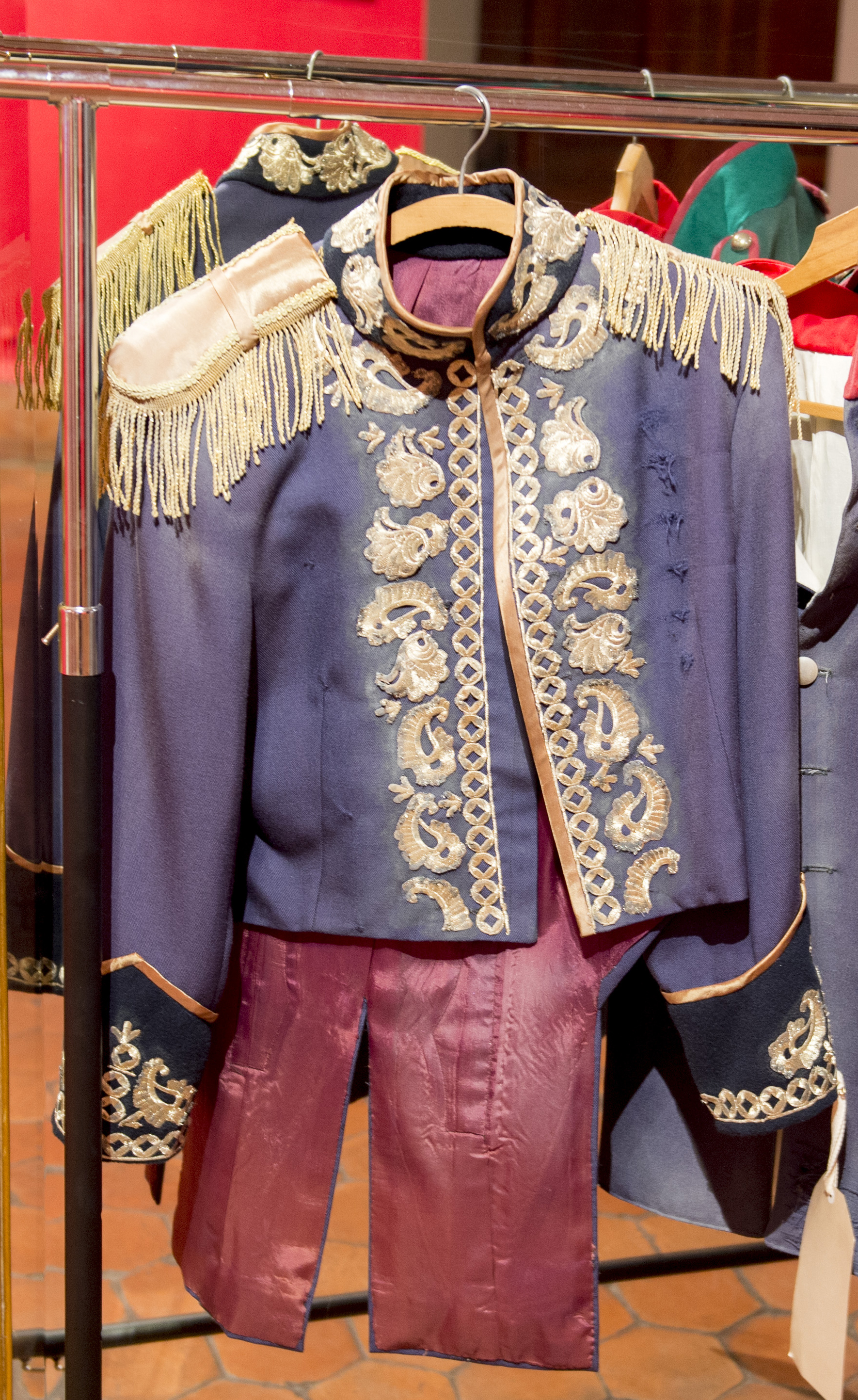 Uniforme de Solano López en el Cabildo de Montevideo